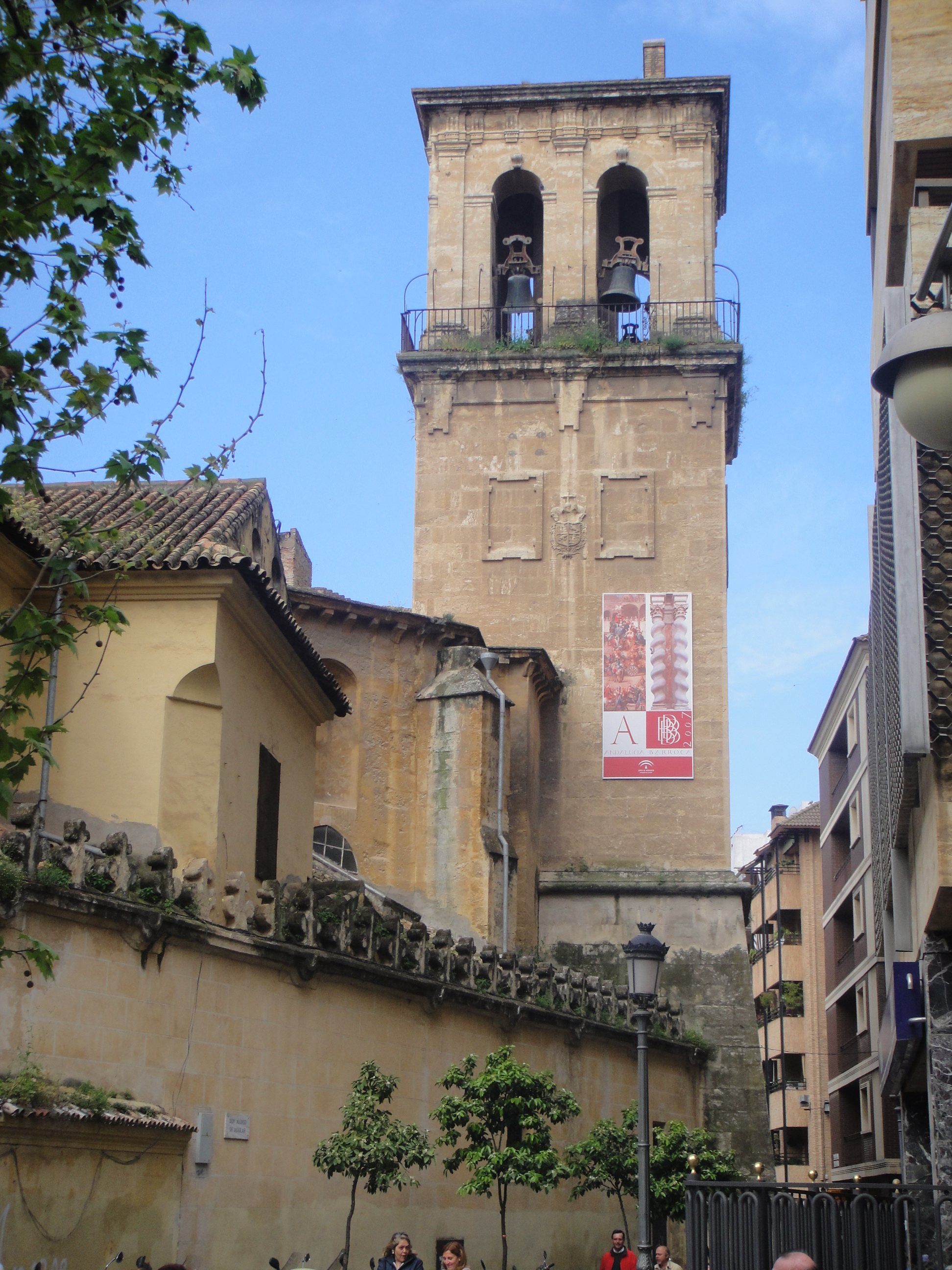 Torre de la iglesia de San Hipólito de Córdoba, provincia de Córdoba, (España).